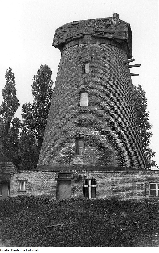 Original image description from the Deutsche Fotothek Michendorf. Wallholländer